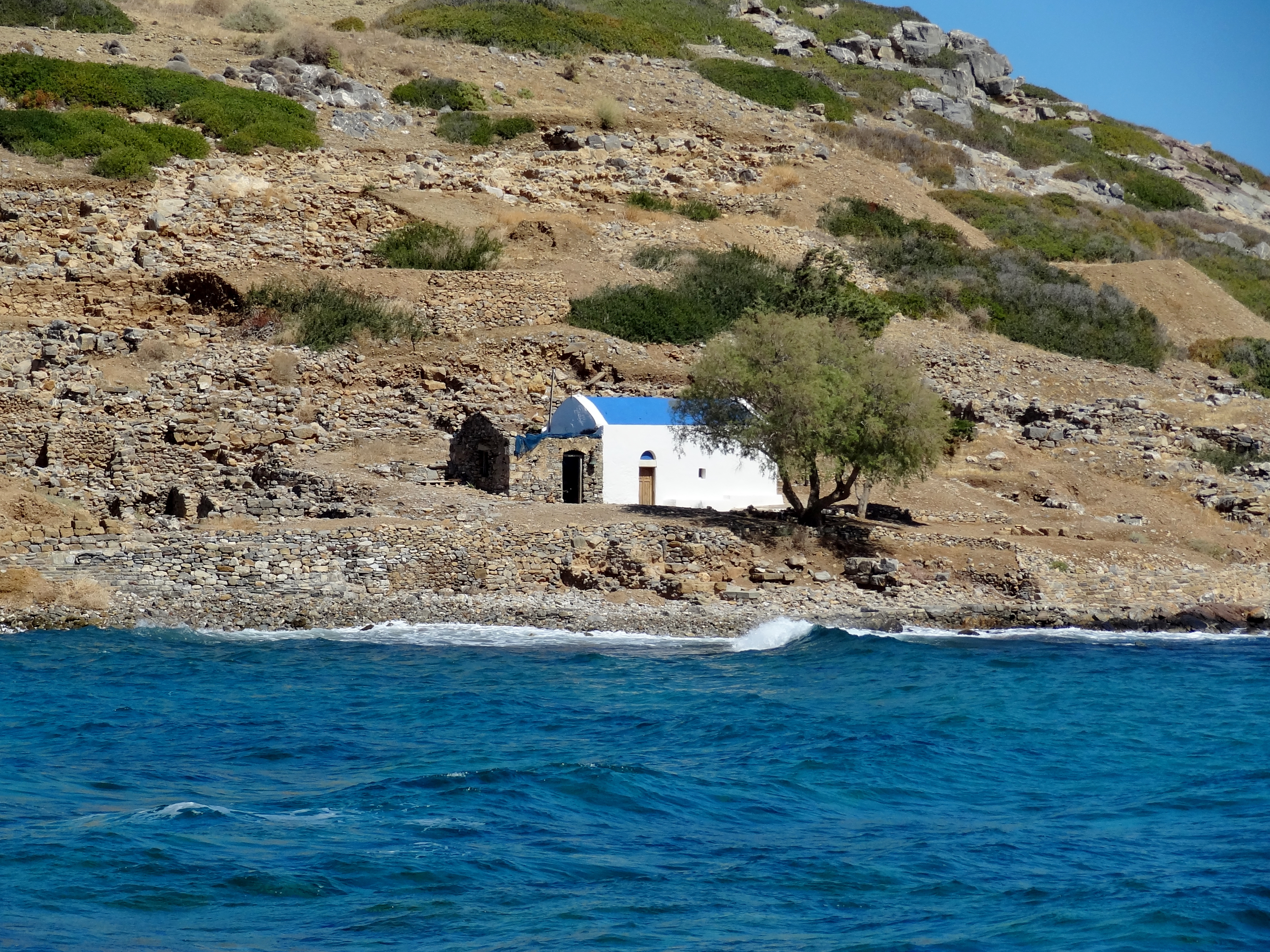 Ausgrabungsstätte auf der Insel Agios Nikolaos (Άγιος Νικόλαος) vor Mochlos (Μόχλος), Kreta, Griechenland